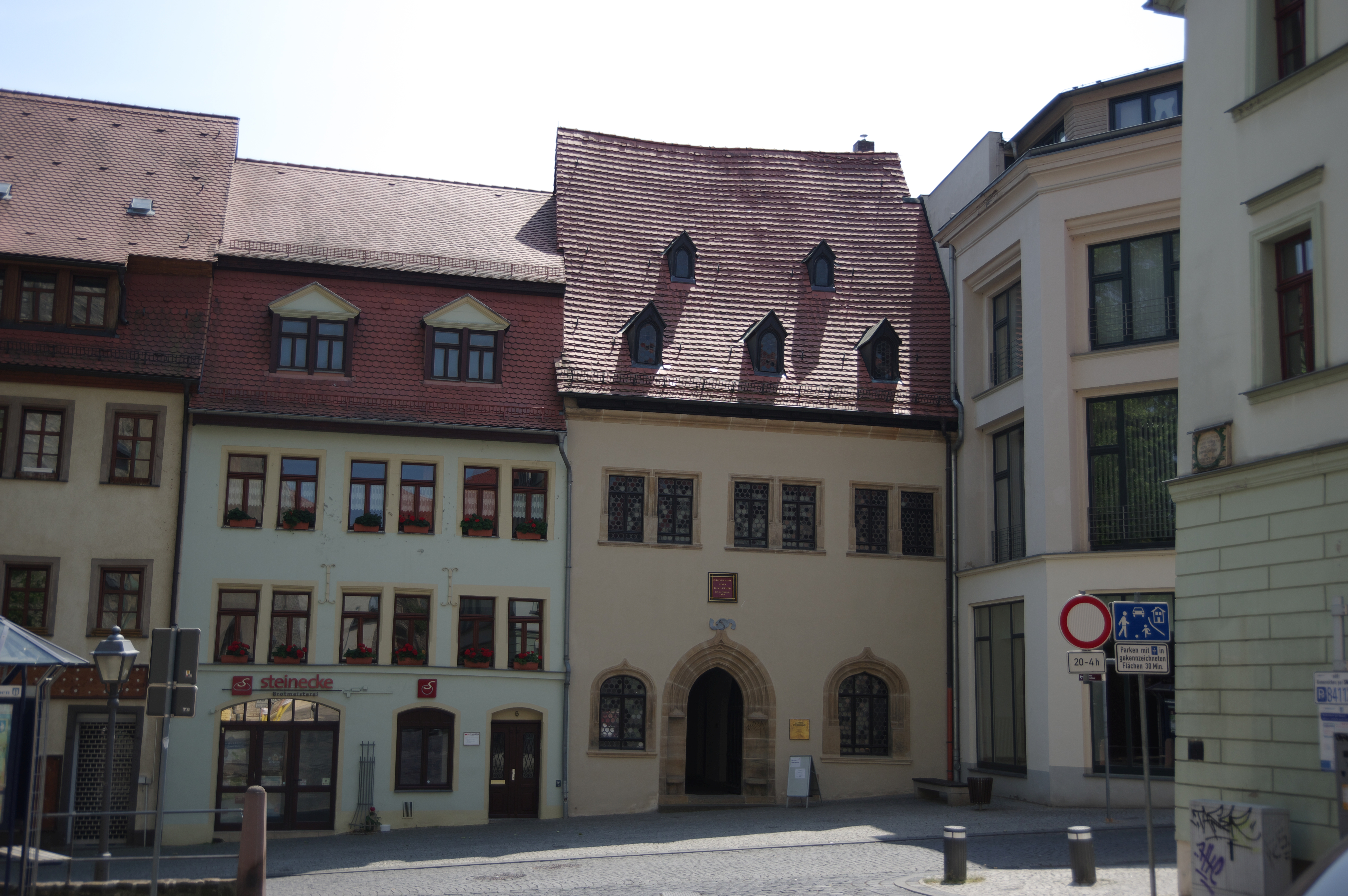 Lutherstadt Eislleben. Das Haus am Andreaskirchplatz (Nummer im Namen der Datei) steht unter Denkmalschutz.